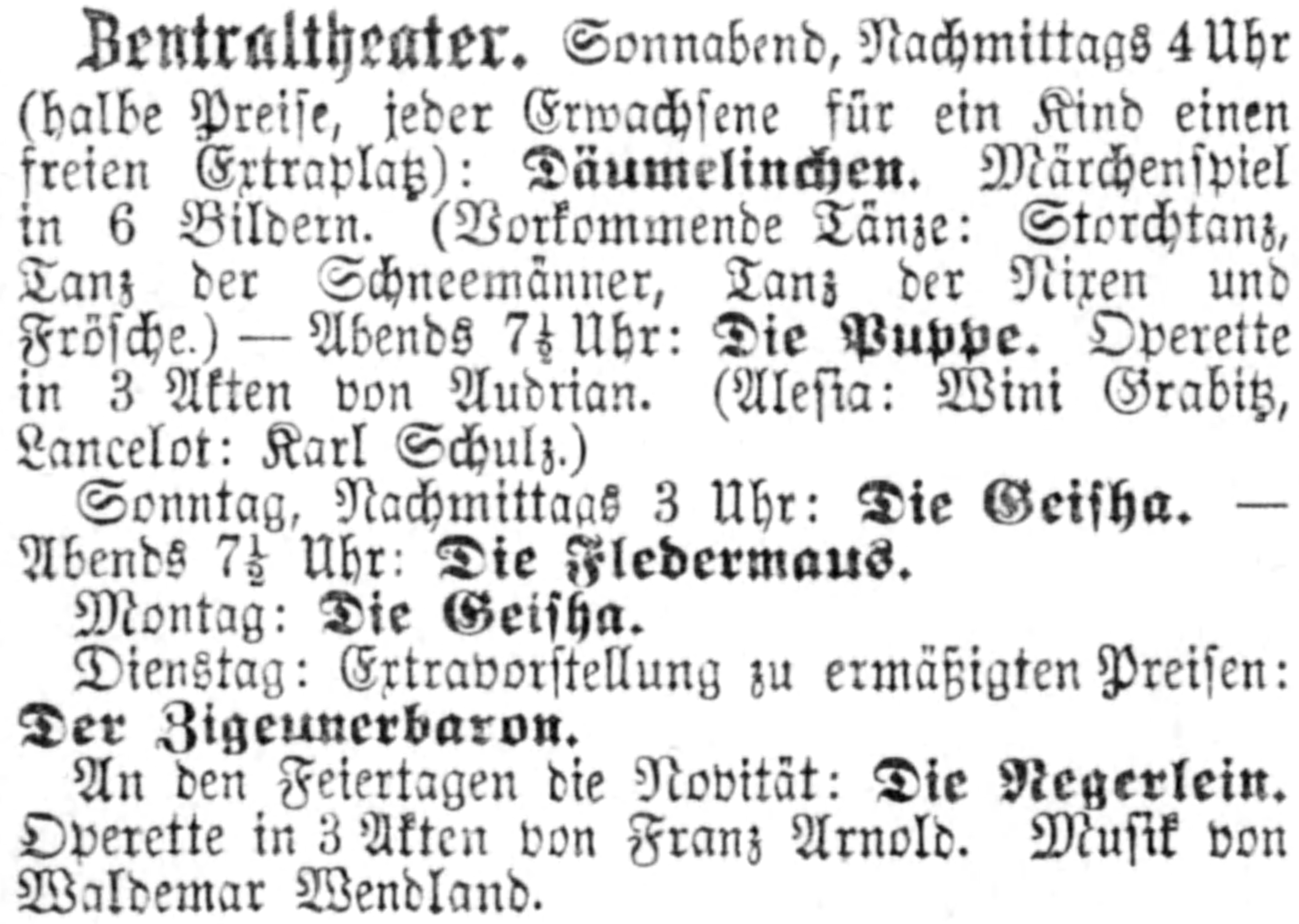 Spielplan Zentraltheater Berlin